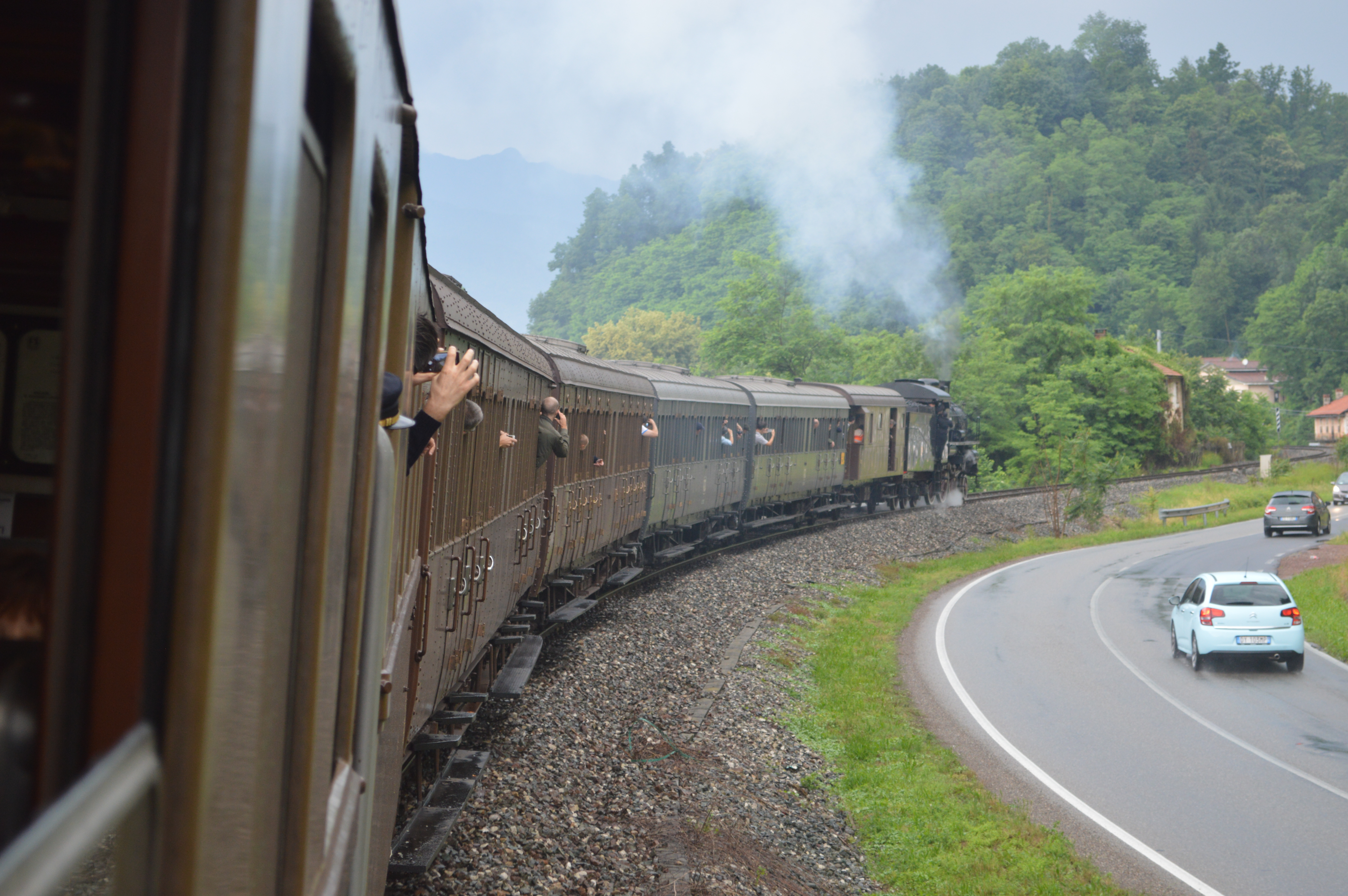 Treno storico nei pressi di Borgosesia, composto dalle carrozze Centoporte a trazione vapore, diretto a Varallo Sesia.